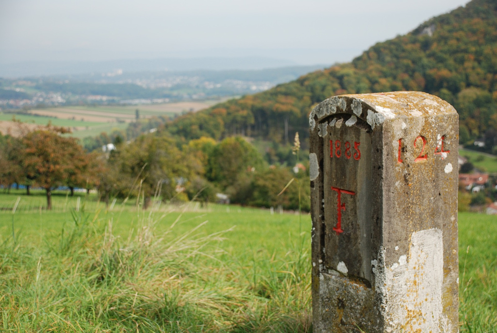 Landesgrenze bei Flüh (SO) aus der Sicht von Frankreich!